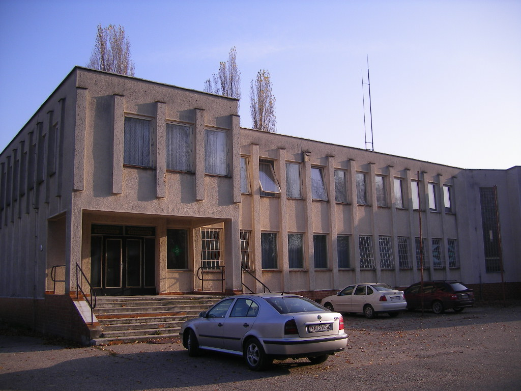 Keszegfalva - a mezőgazdasági szövetkezet székháza